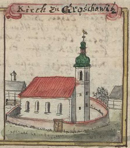 Kirche in Groschowitz in Oberschlesien